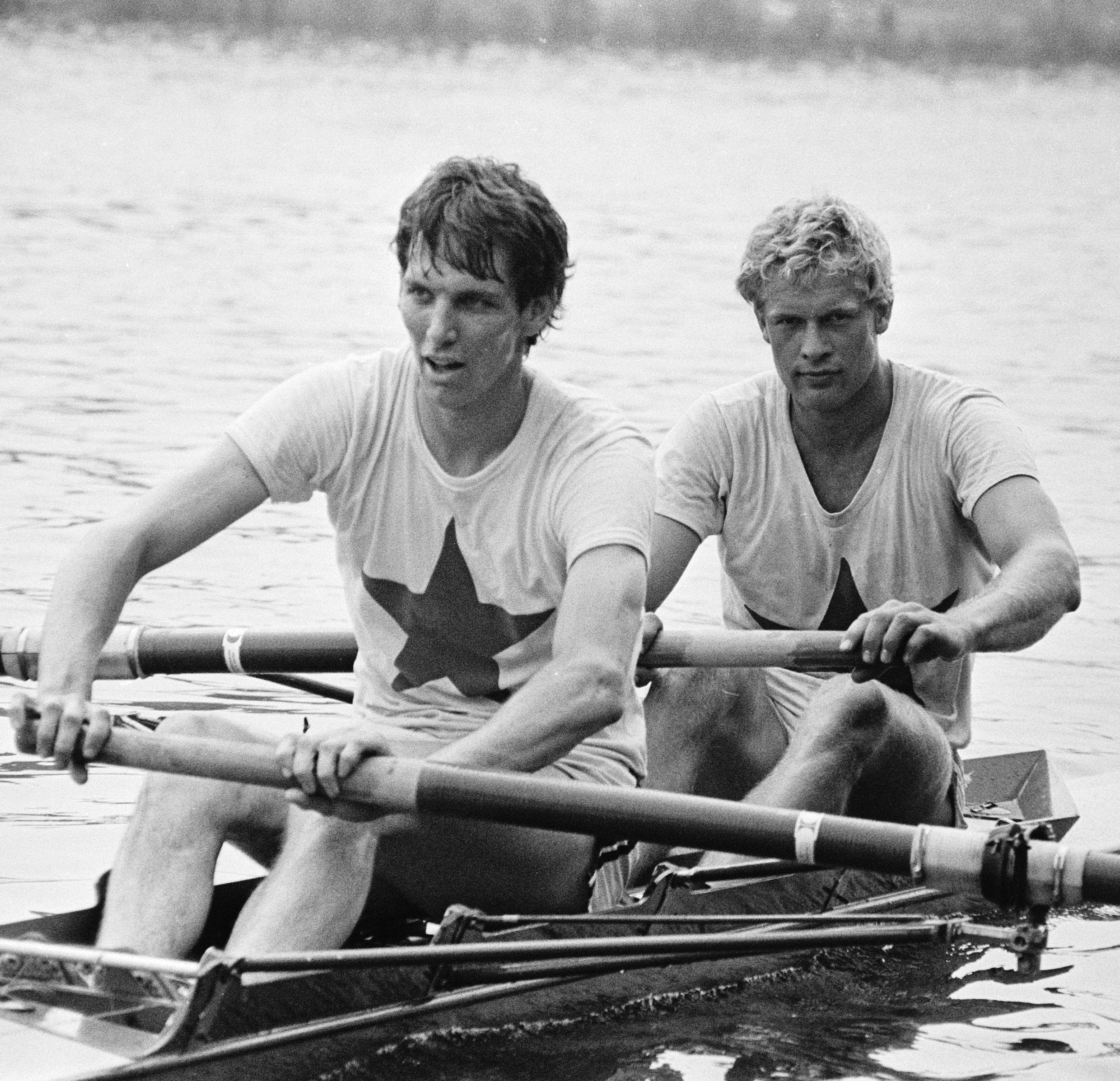 ARB-roeiwedstrijden op Bosbaan; twee zonder stuurman van Aegir. Links Joost Adema en rechts Sjoerd Hoekstra